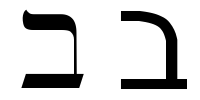 hebrew letter bet